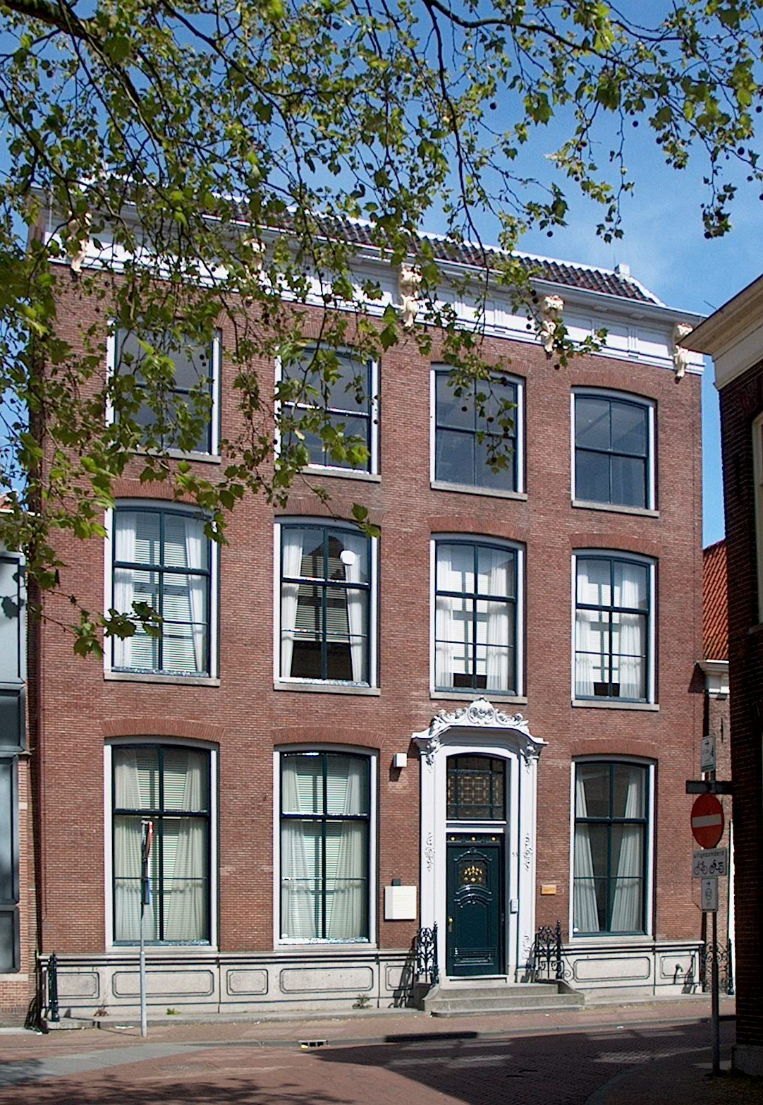 Hoorn, Grote Oost 53 (IM012941)